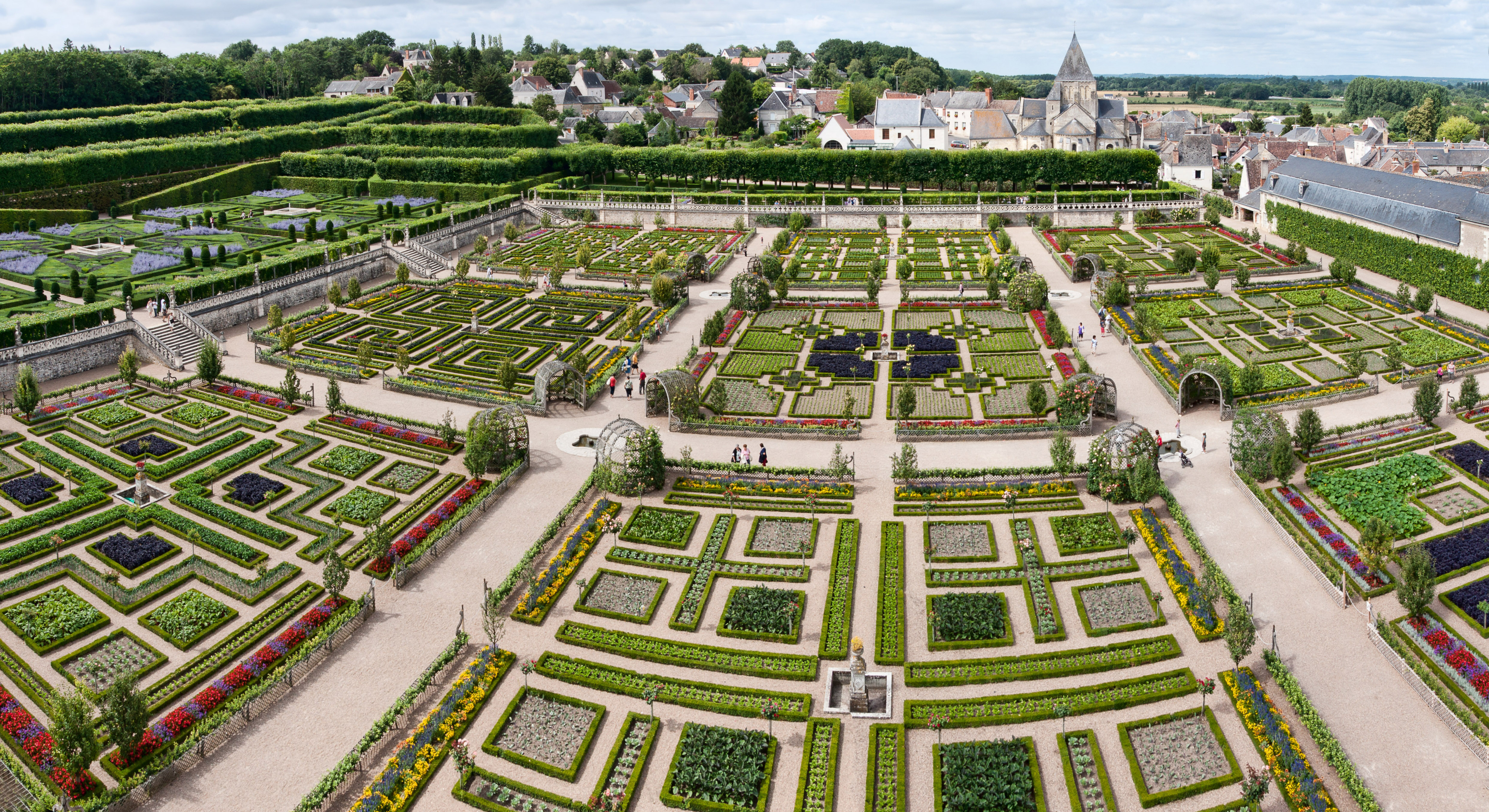 Chateau de Villandry. Vue des jardin panoramique.